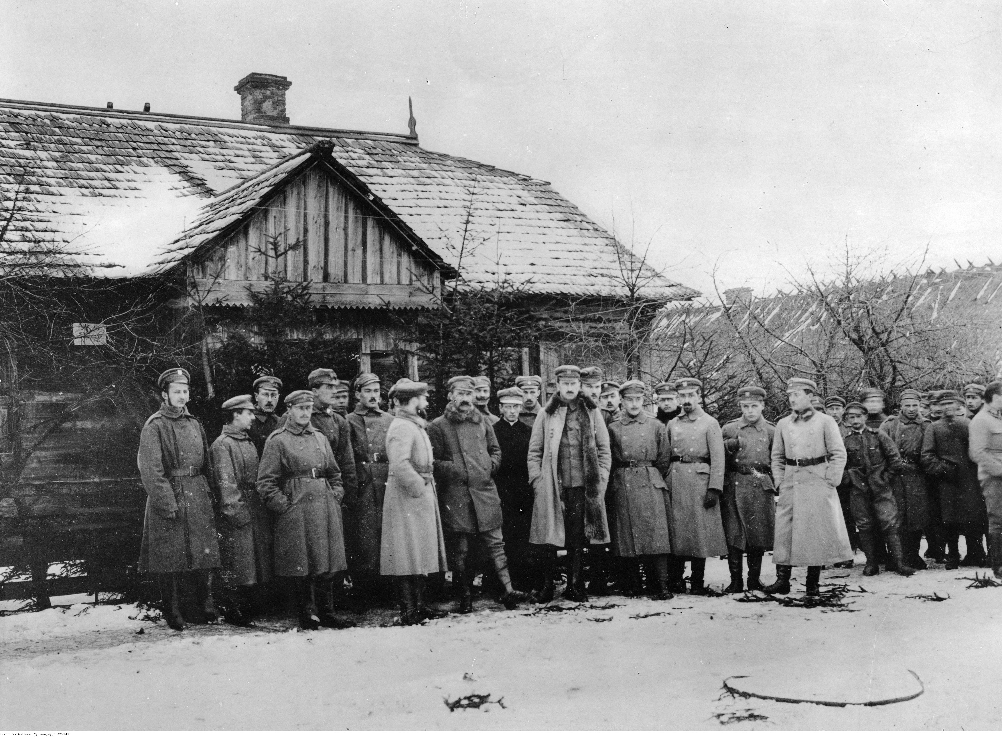 Składanie życzeń noworocznych Piłsudskiemu. Widoczni od lewej (poza Piłsudskim): Bekert, Michał Grossek, Leon Grot, Franciszek Dubiel, porucznik 1 pułku piechoty I Brygady Legionów Polskich, Adolf Poręba-Porębski, Rudolf Maćko-Złom, Edward Zinth-Rzecki, oficer 6 batalionu I Brygady, Żymirski, Składkowski, ks.Stanisław Żytkiewicz, kapelan 5 pułku piechoty I Brygady Legionów, Świtek, mjr Albin Fleszar ps. "Satyr", oficer 6 batalionu I Brygady Legionów, Kababiński, Stanisław Parczyński ps. "Młot", Kazimierz, Mały, Tadeusz Majewski, Rokita-Maksymowicz, porucznik 5 pułku piechoty I Brygady Legionów (ostatni z prawej).